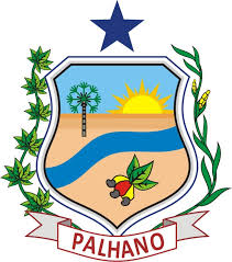 Brasão do Município de Palhano, Ceará, Brasil.